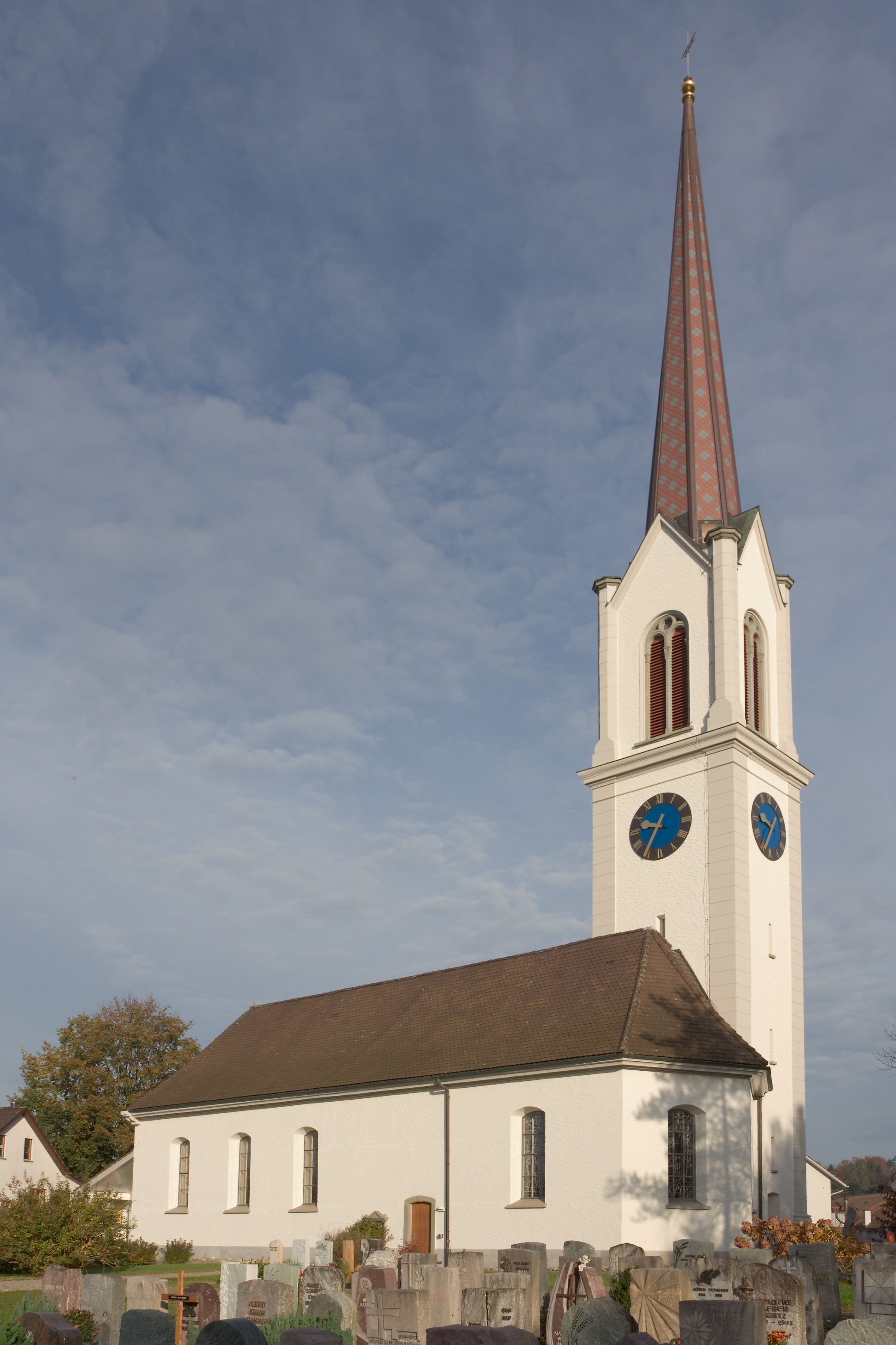 reformierte Kirche in Matzingen, Schweiz